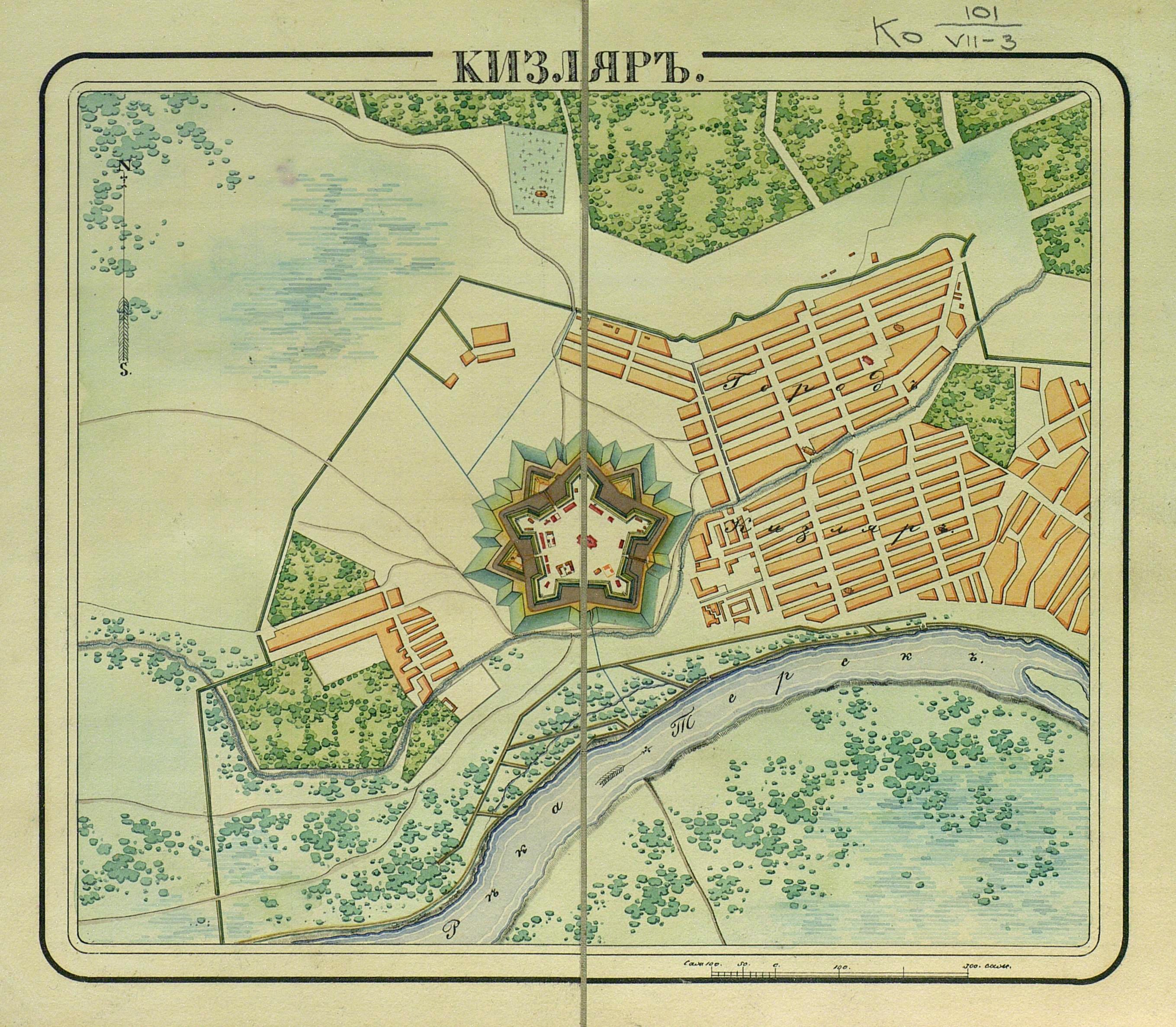 Кизляр.